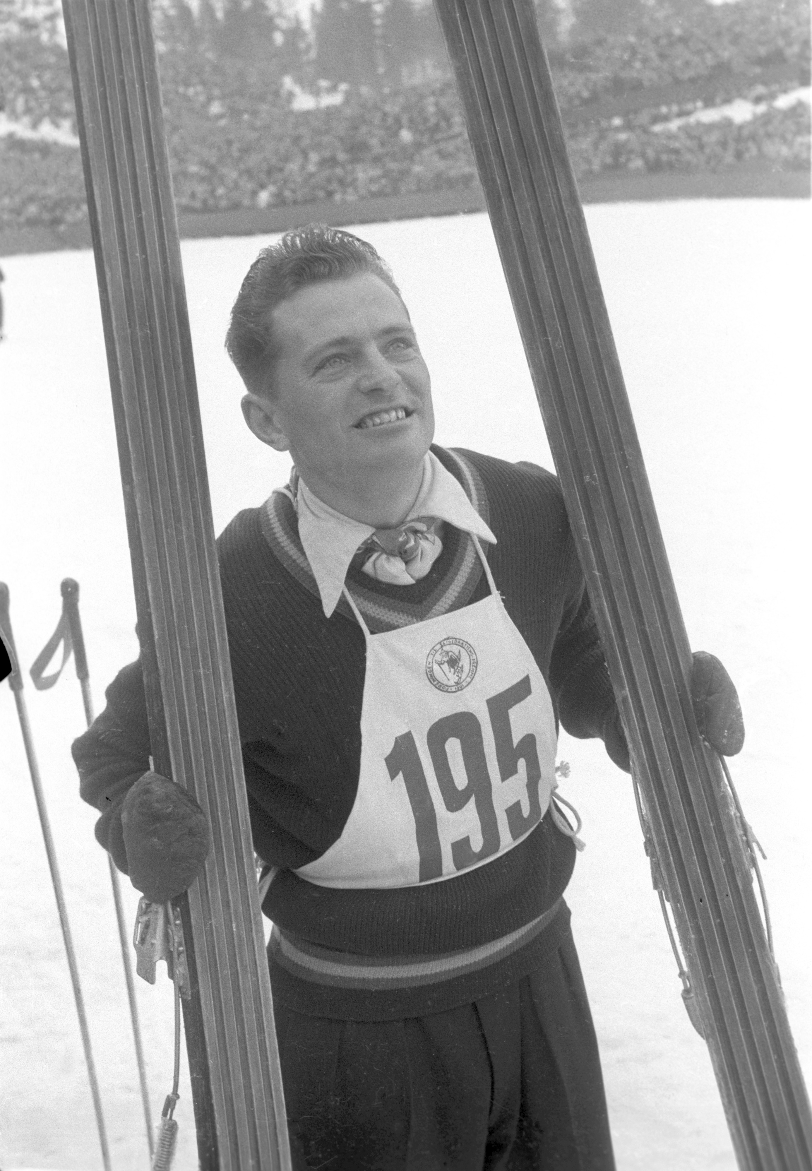 Arnfinn Bergmann